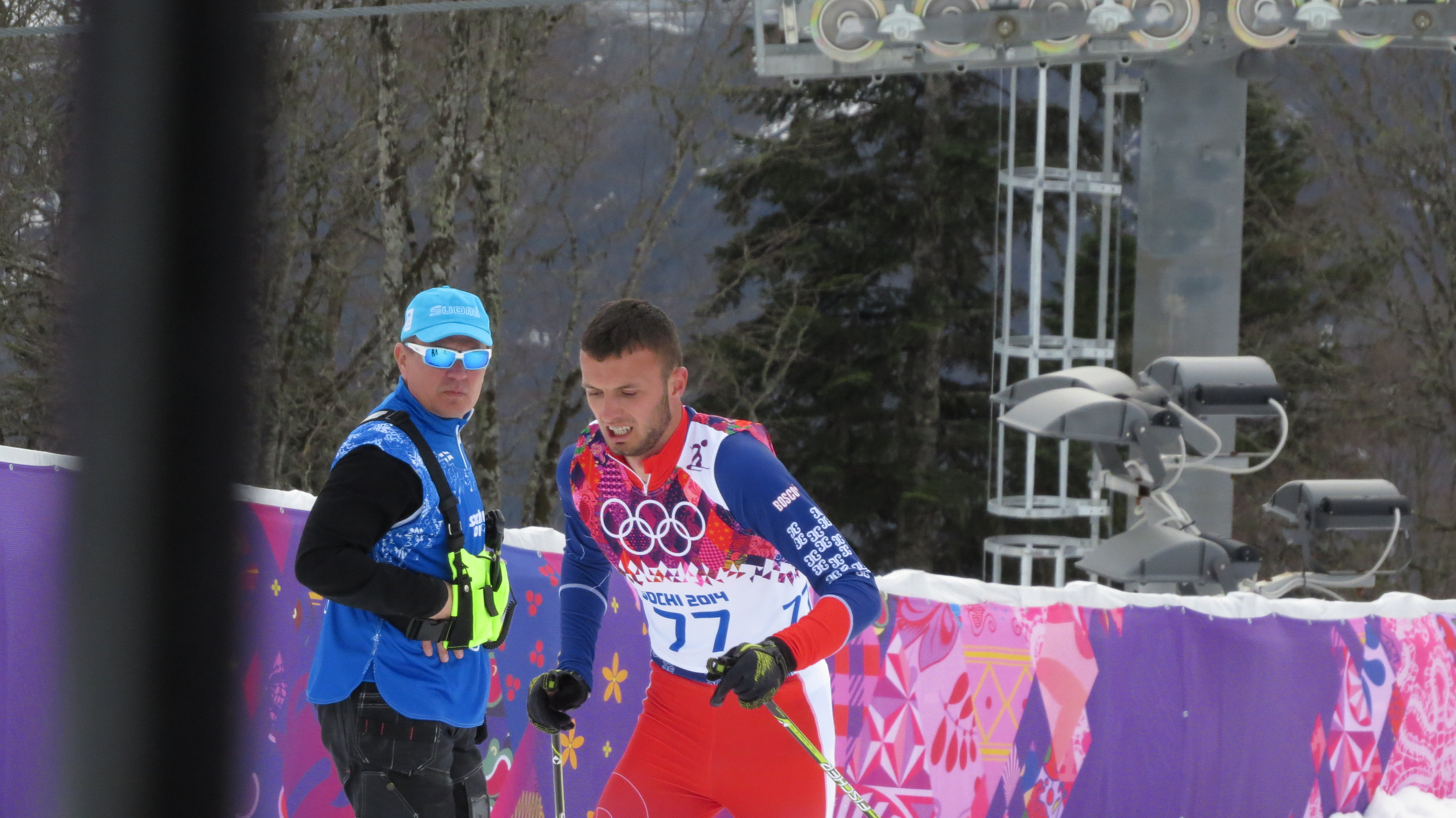 Лыжные гонки на зимних Олимпийских играх 2014 — 15 км классическим стилем (мужчины)